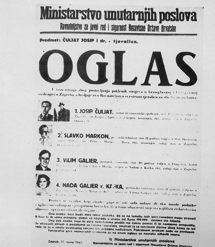 Srpskohrvatski / српскохрватски: Potjernica za izvršiocima diverzije u zagrebačkoj Glavnoj pošti 1941. godine.